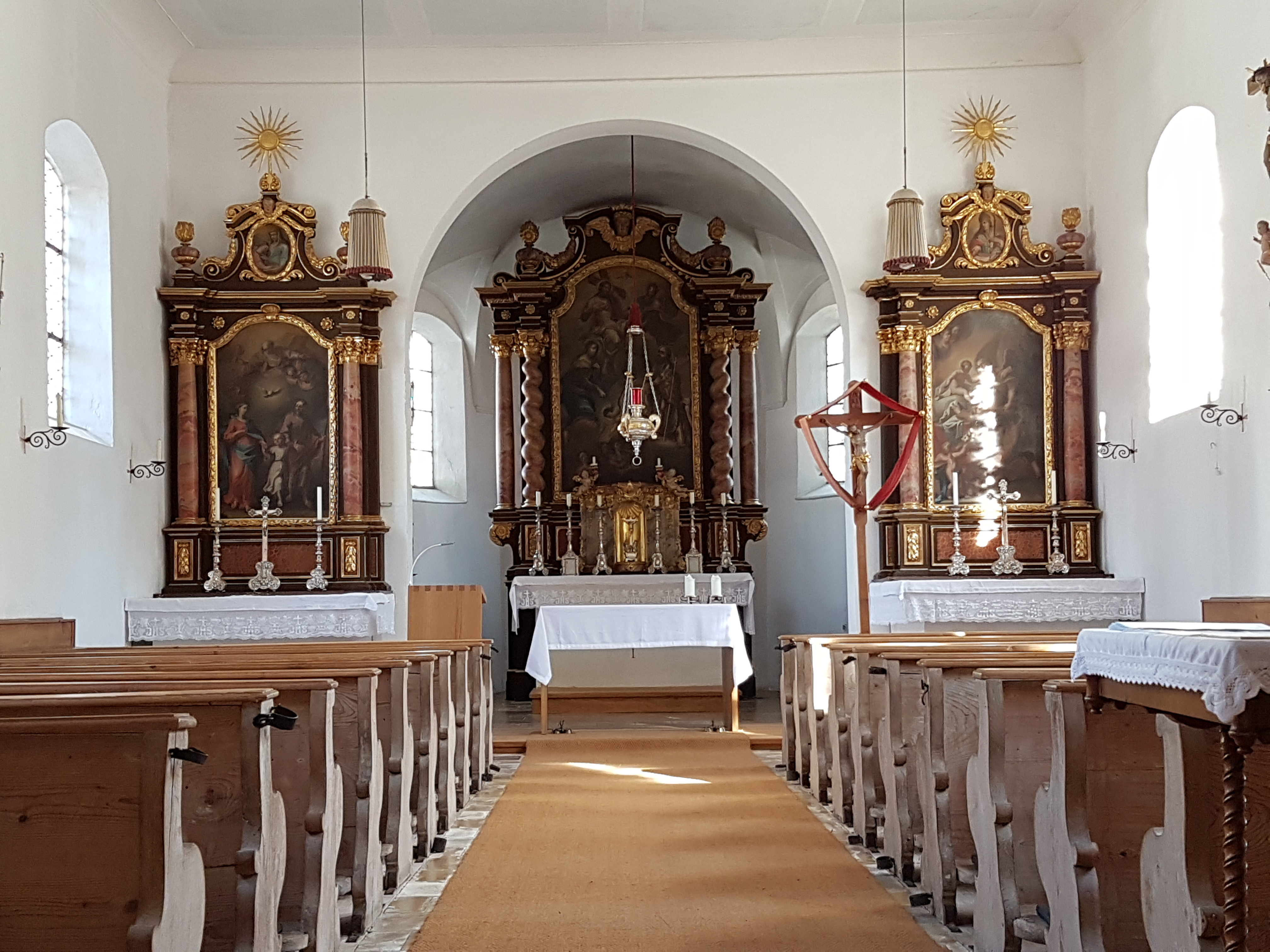 St. Martin (Martinsried), Hoch- und Seitenaltäre